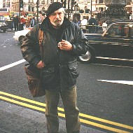 А.В. Лайко в Лондоне, 1998 г.